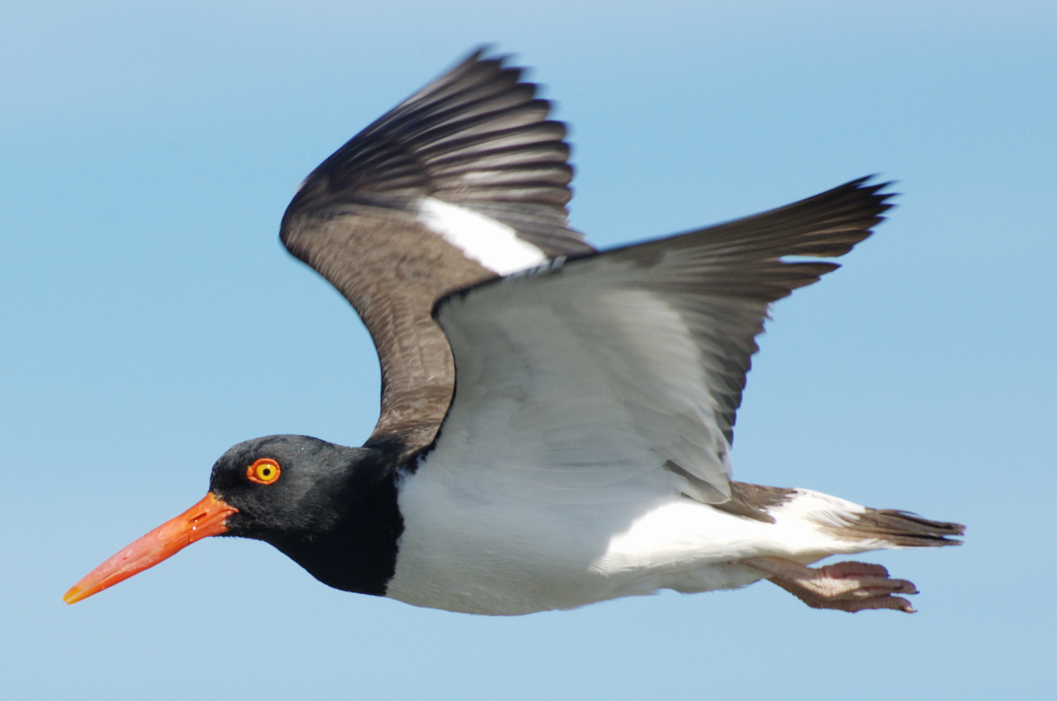 Haematopus palliatus OSTRERO COMÚN